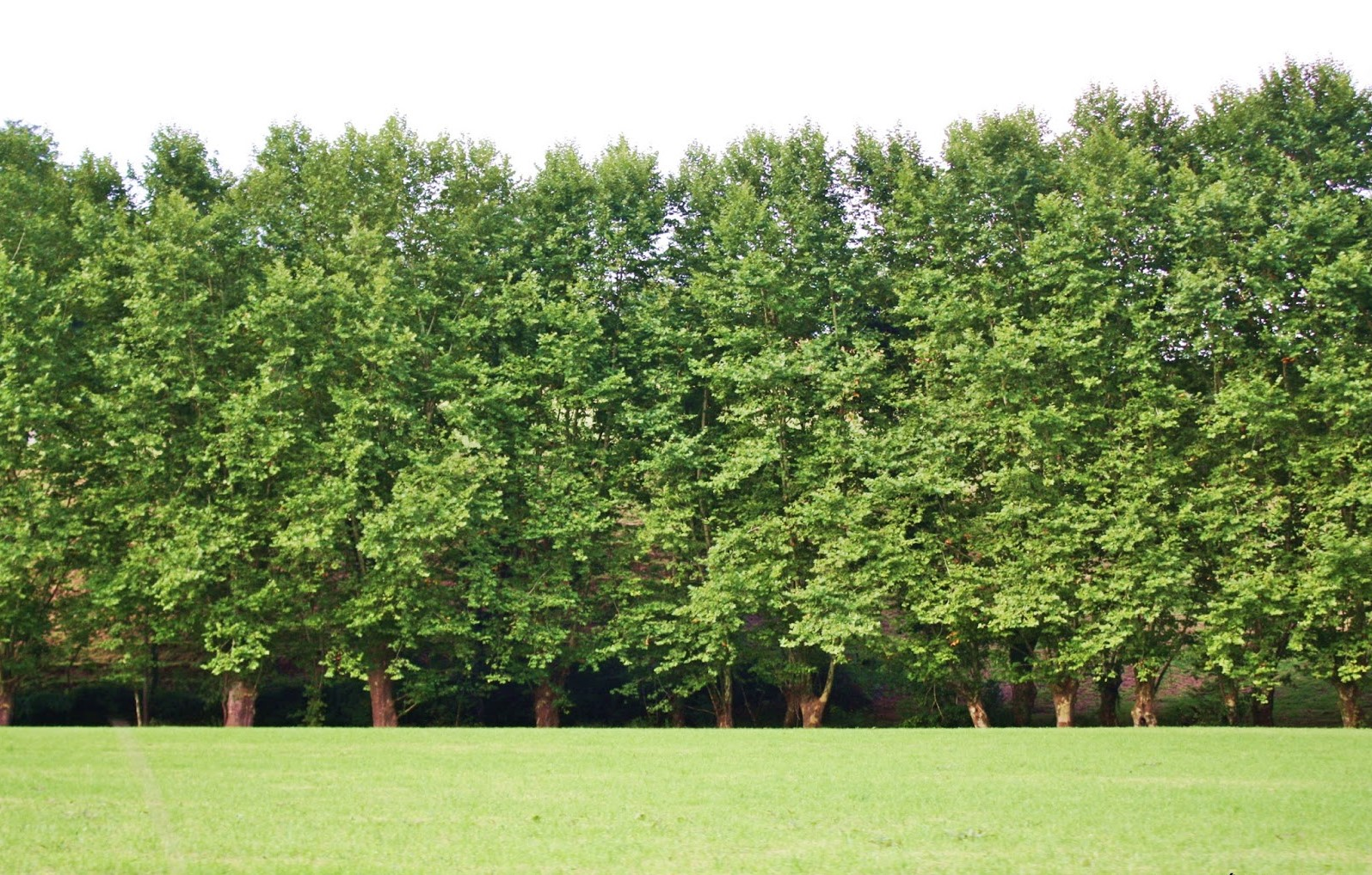 Robledales de Ultzama y Basaburua This is a photography of a Special Area of Conservation in Spain with the ID: ES2200043. Natura2000 entry, EEA entry